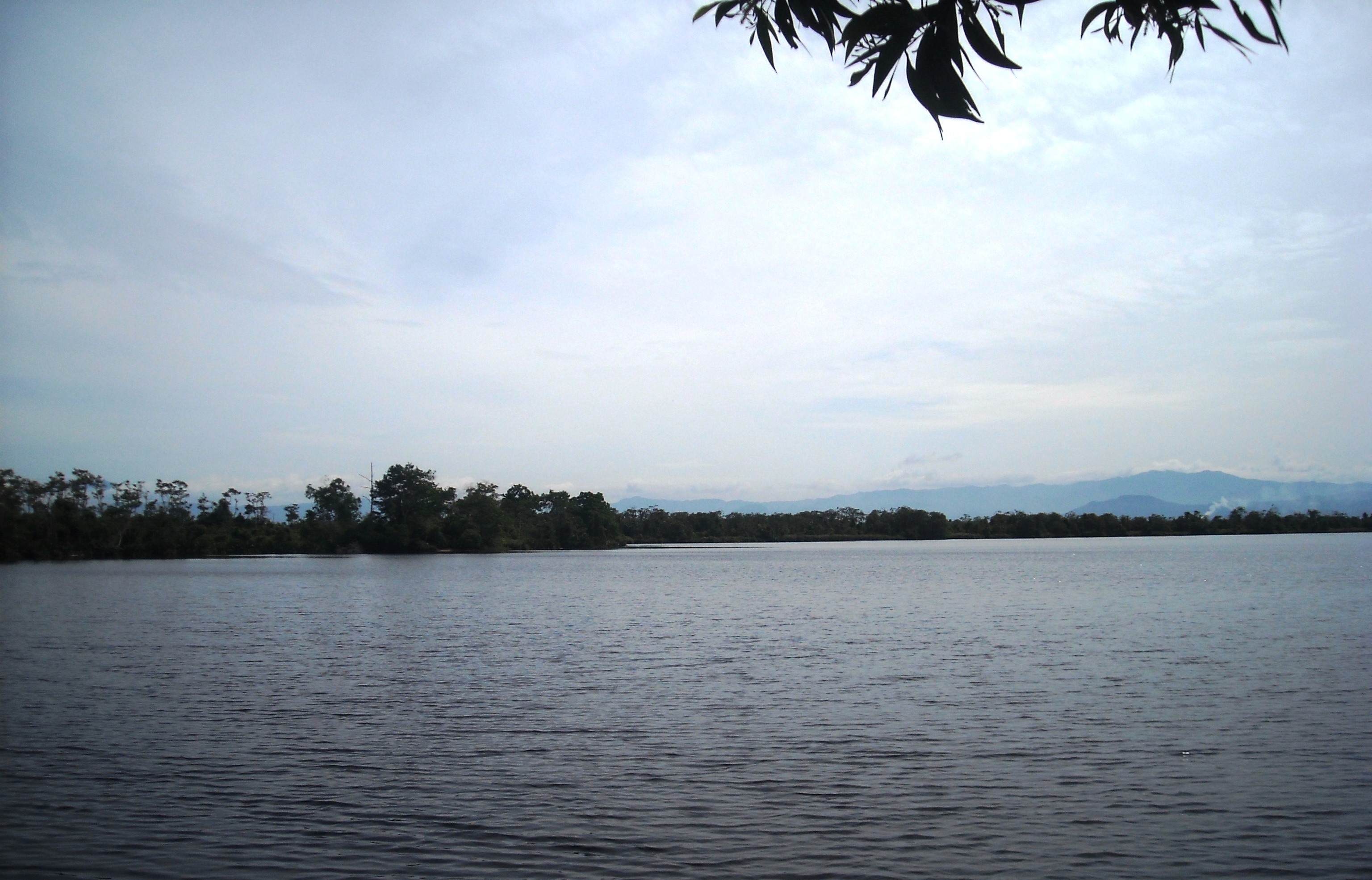 Danau Dendam Tak Sudah di Provinsi Bengkulu